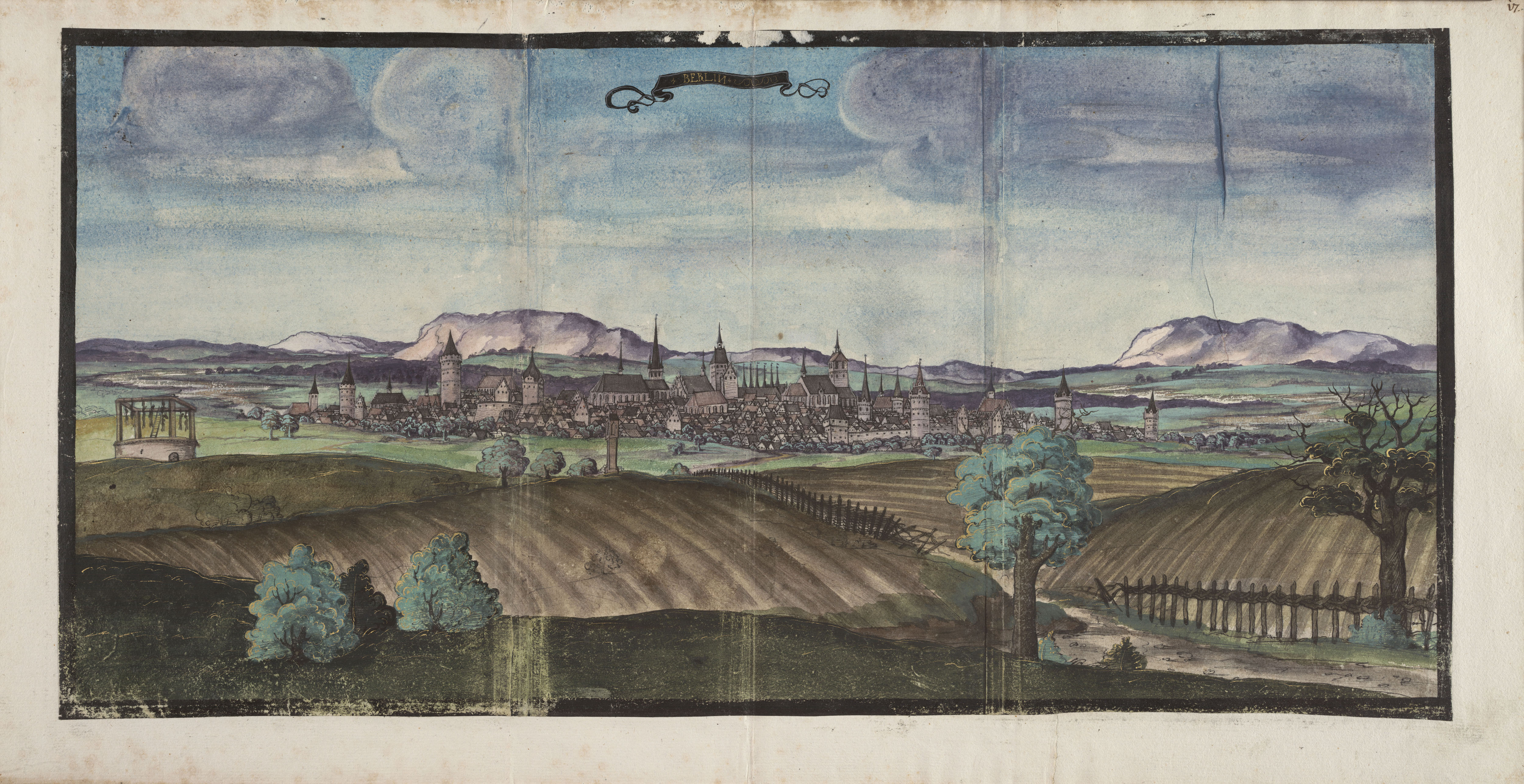 Frühe histotrische Stadtansicht von Berlin aus dem Reisealbum des Pfalzgrafen Ottheinrich